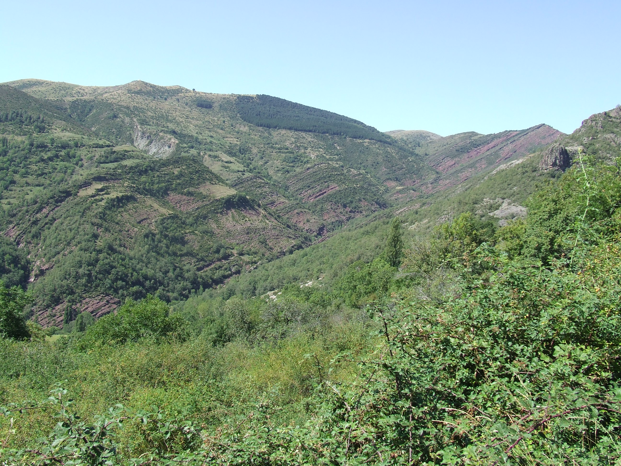 Barranc Roi (la Torre de Cabdella, Pallars Jussà)